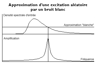 Approximation d’une excitation aléatoire par un bruit blanc, graphique personnel